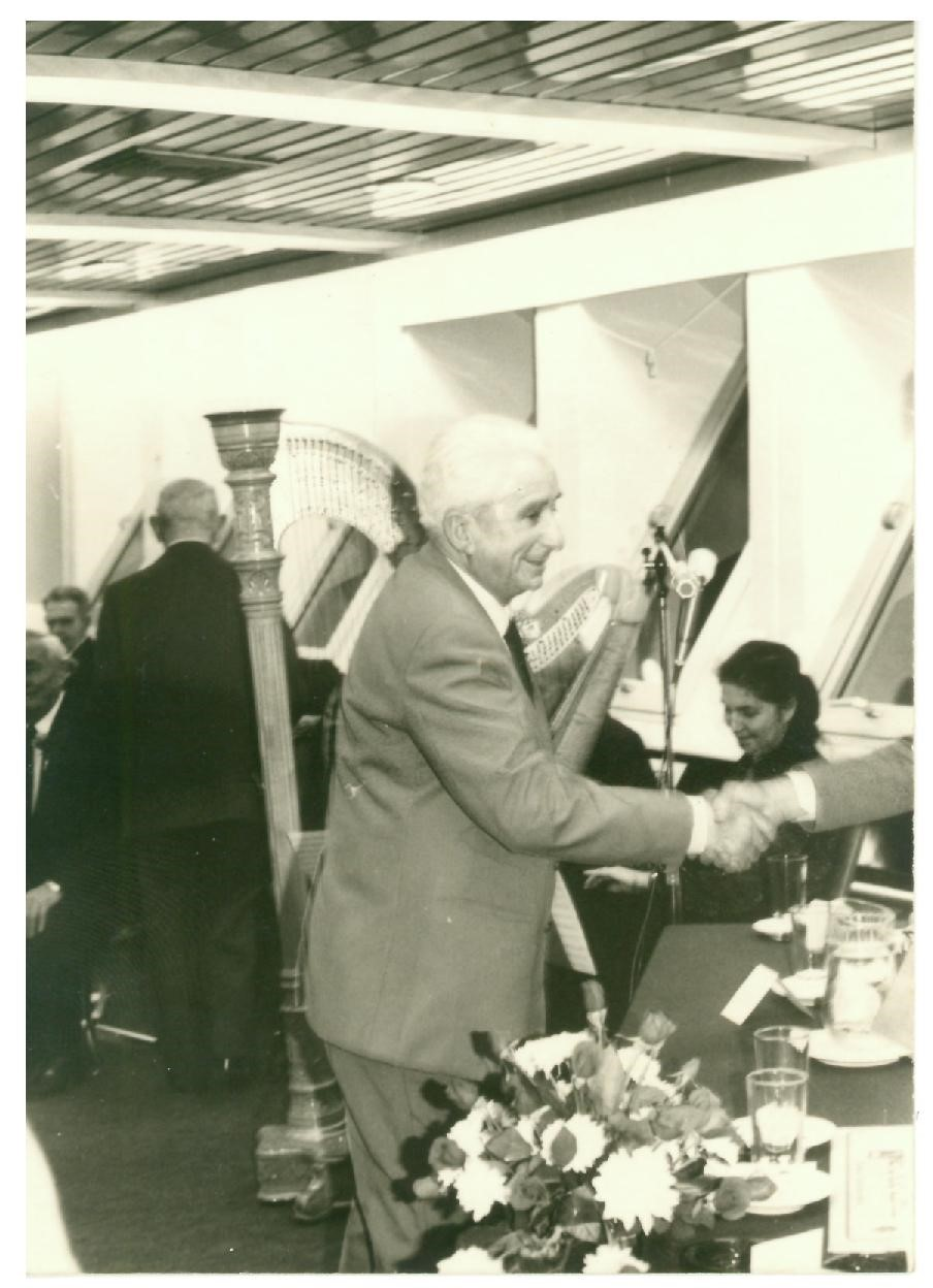 הרצל גרינשפון מקבל את פרס התעשיינים